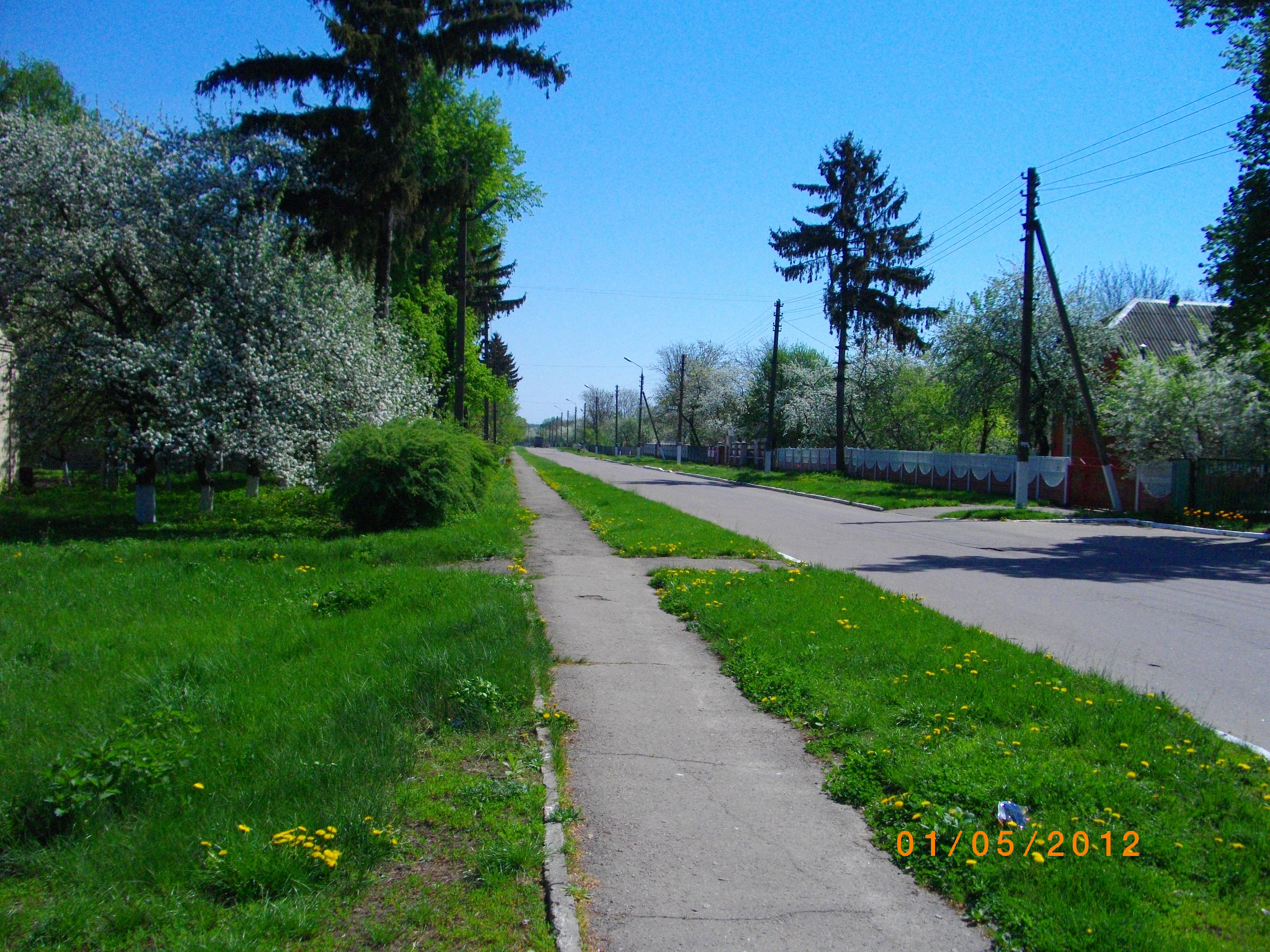 Устимівка